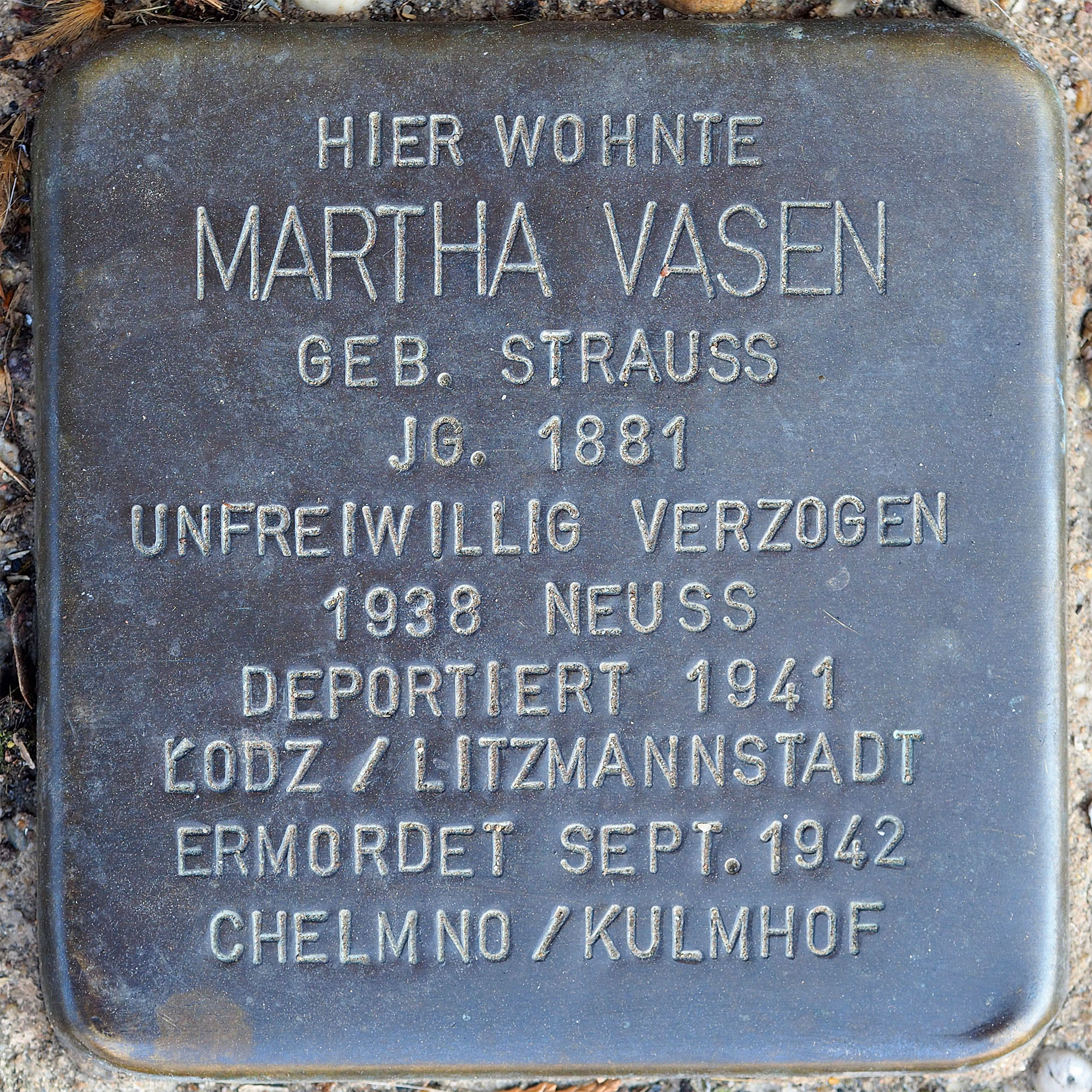 Stolpersteine GV: Vasen, Martha